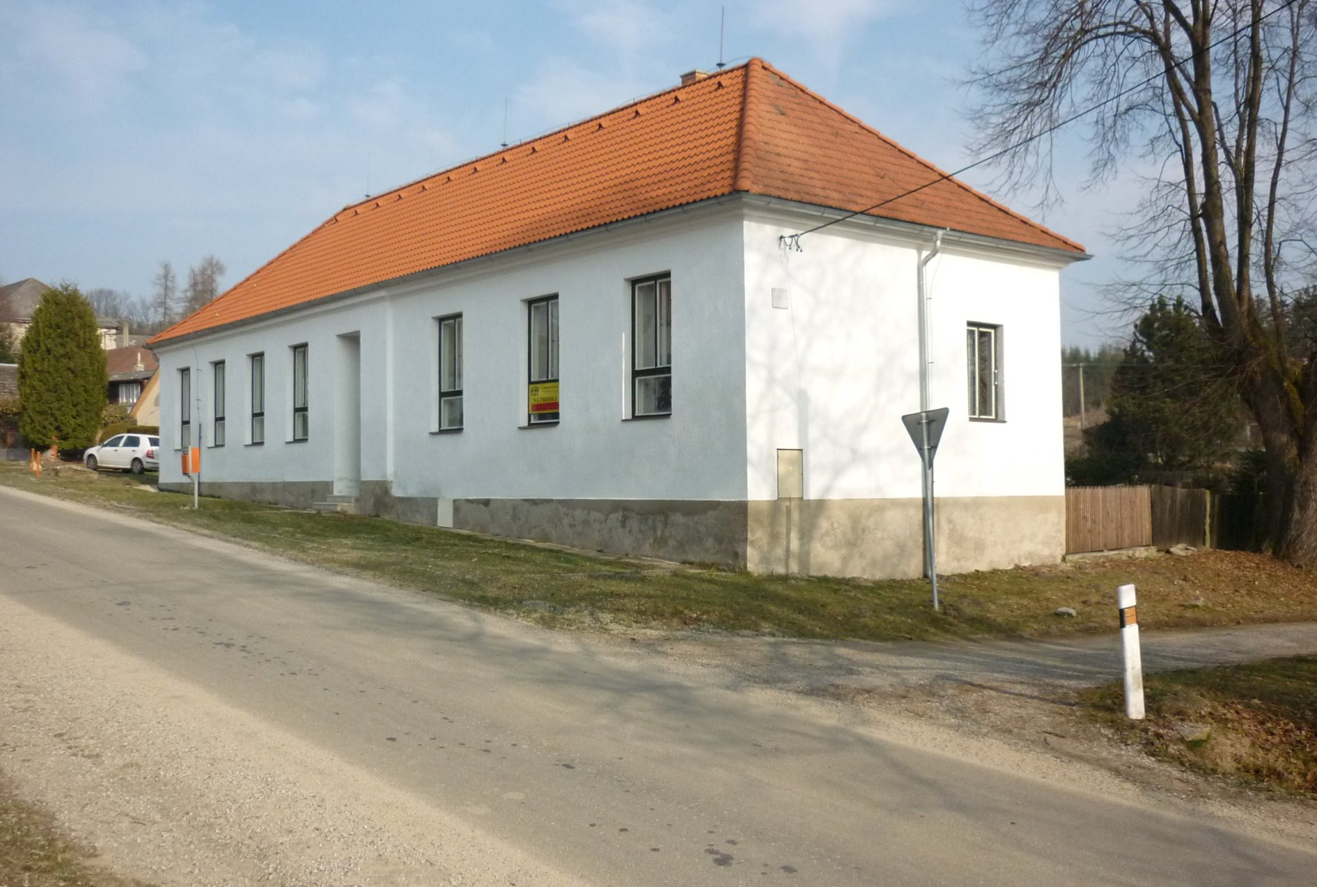 Stálkov čp. 24